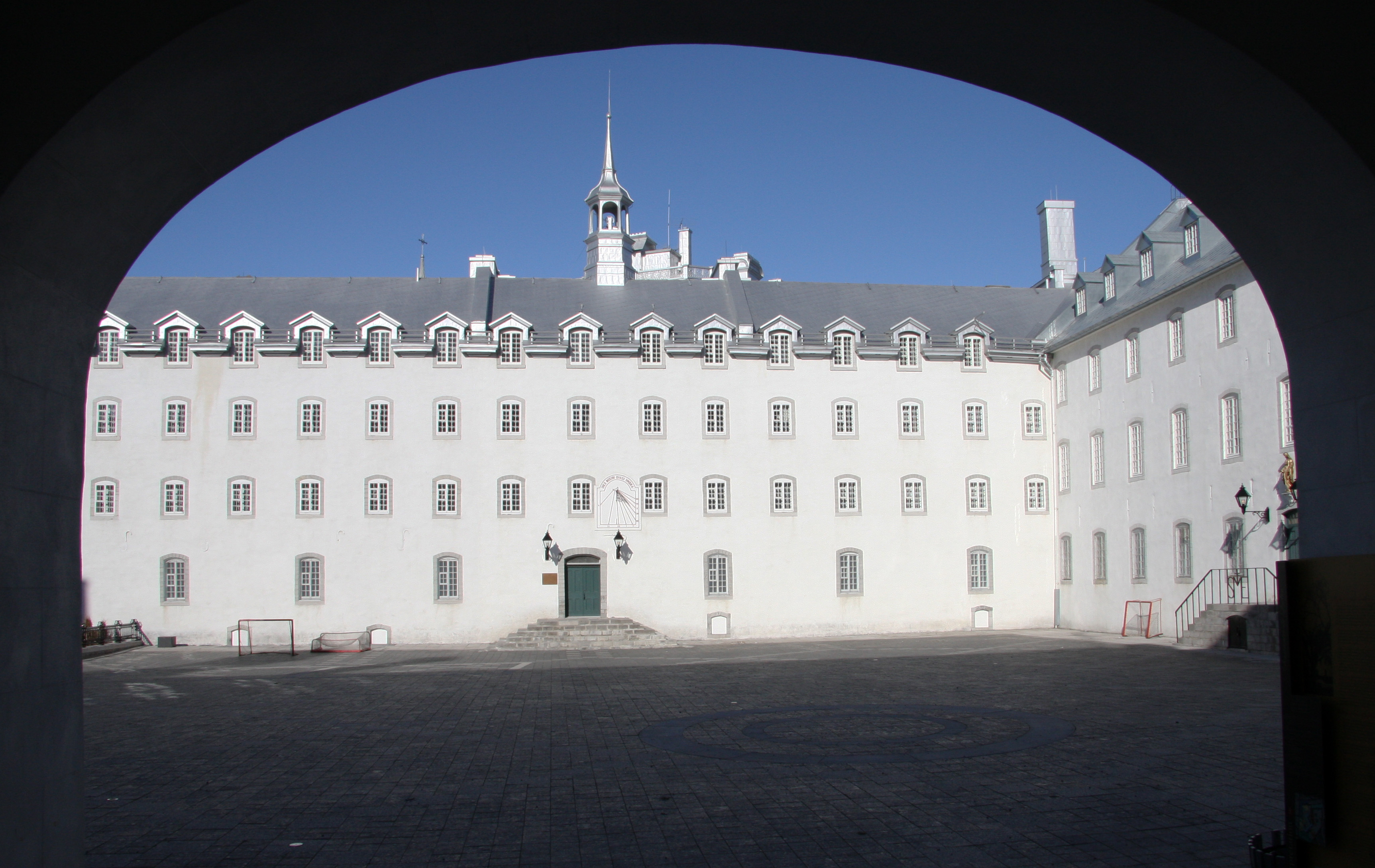 La cour du Séminaire de Québec